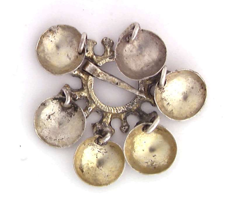 Sporesølje fra Telemark i forgylt sølv med løv, Foto: Anne-Lise Reinsfelt / Norsk Folkemuseum, NF.1909-1550.